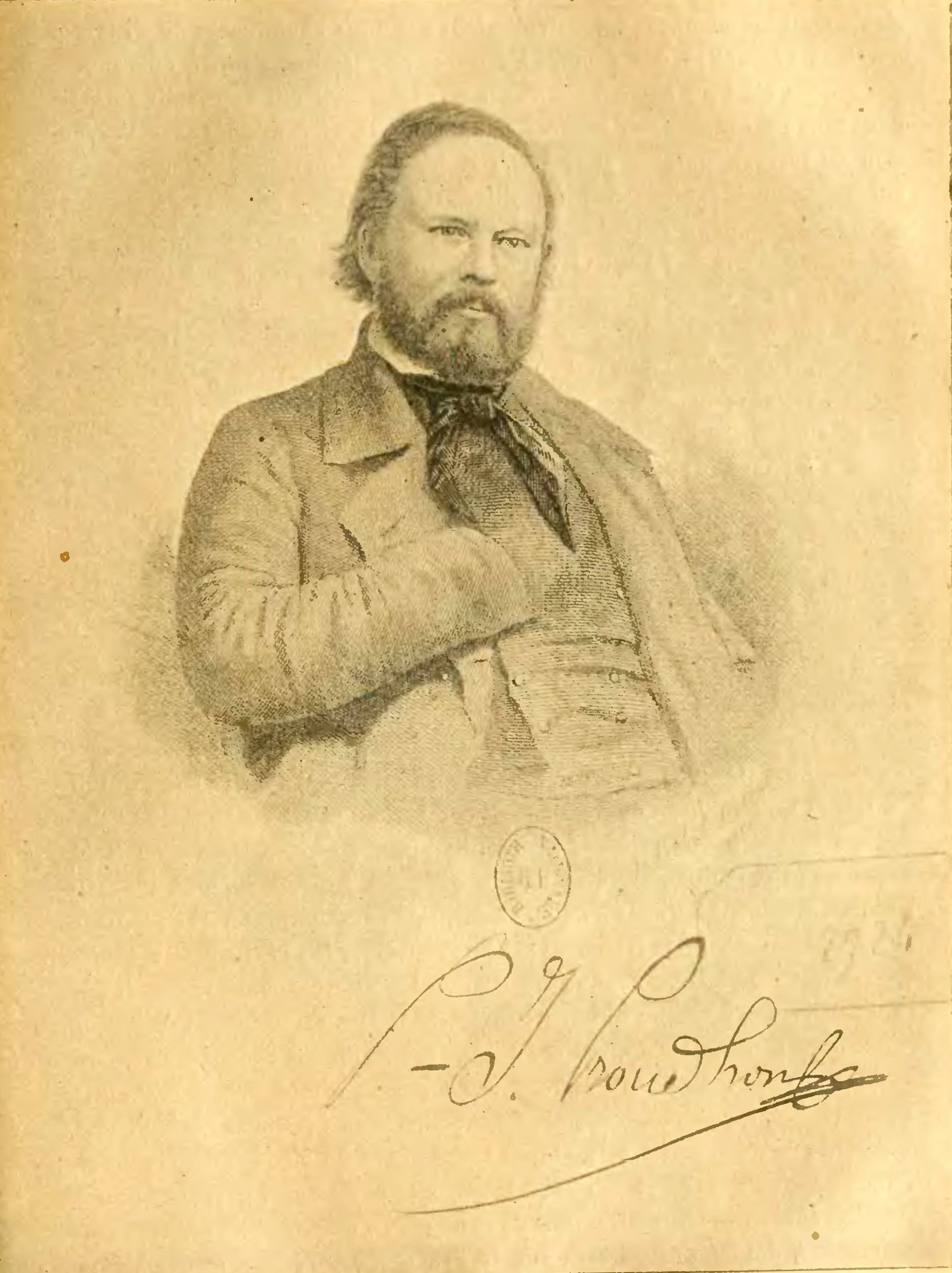 Histoire socialiste sous la direction de Jean Jaurès 1908, Volume 9, la 2e République, illustration page 317